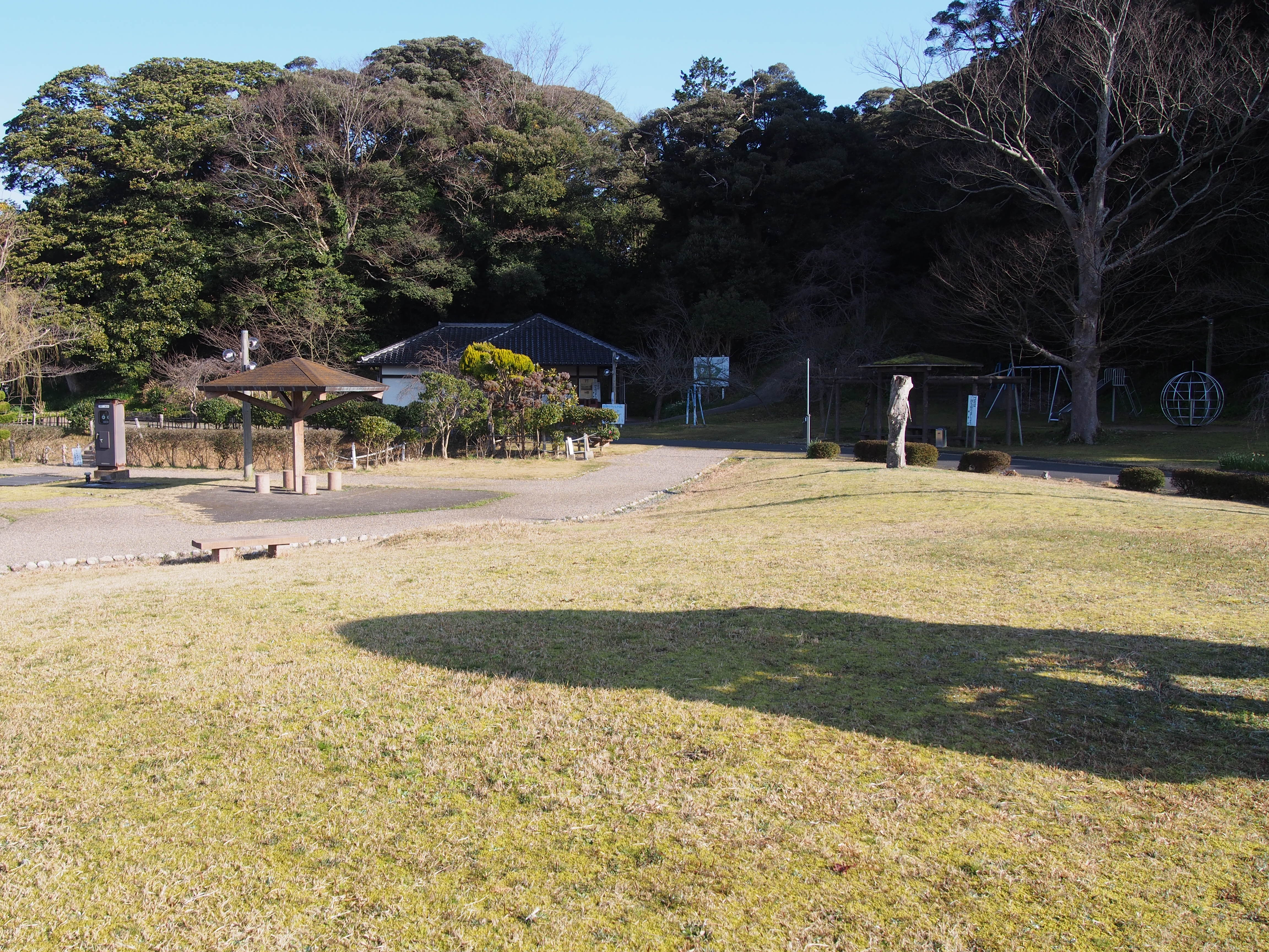 離湖公園(京都府京丹後市網野町小浜)